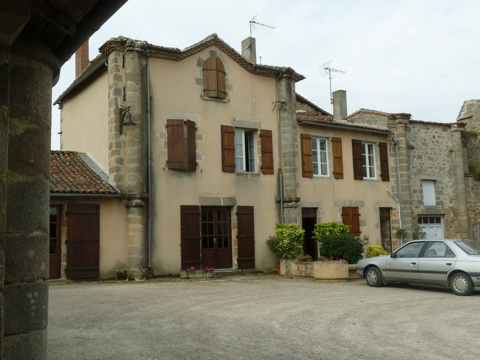 place de l'église de Lesterps, Charente, France; ancienne cour de l'abbaye, anciennes colonnes